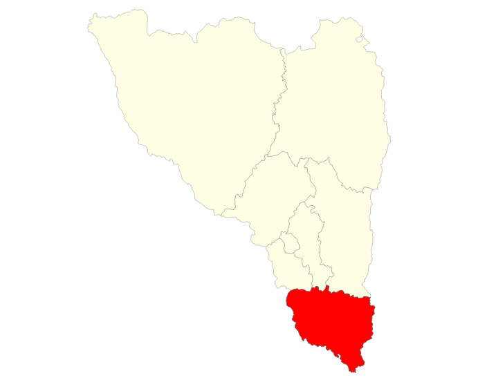 Localisation du district d'Andramasina dans la région Analamanga